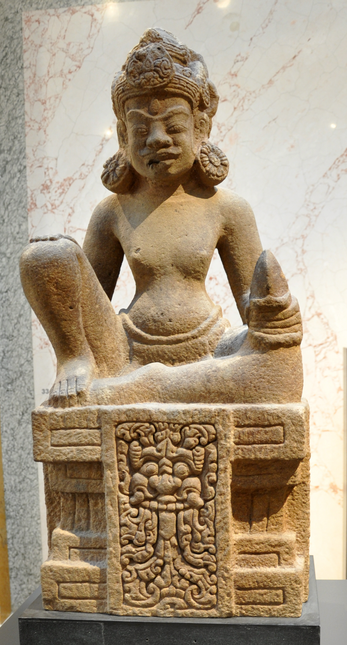 Sitzende Gottheit; Vietnam, Champa-Reich, Provinz Quang Nam, Temepelkomplex von Dong-du'o'ng, spätes 9. Jh.; Sandstein Museum Rietberg, Zürich; Geschenk Eduard von der Heydt; Inv. Nr. RHI 402